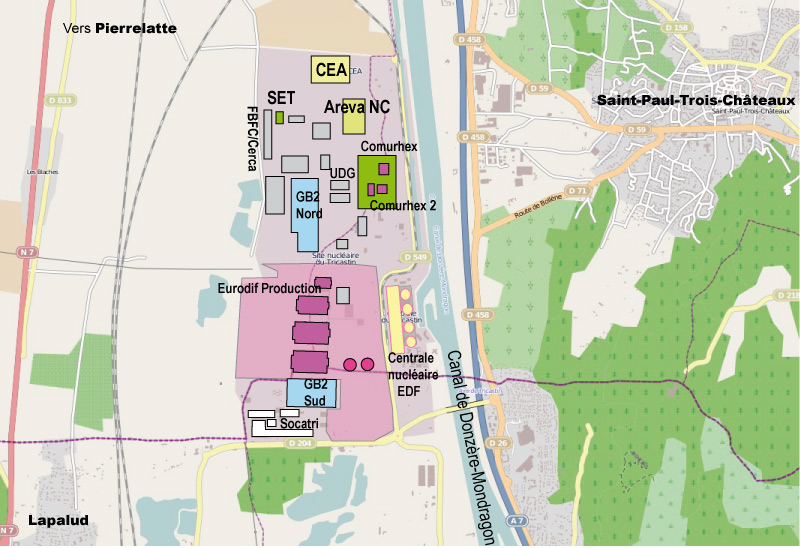 Carte simplifiée du site nucléaire du Tricastin CEA : Commissariat à l'Energie Atomique Areva NC : Areva Nuclear Cycle (anciennement Cogema : Compagnie Générale des Matières Atomiques) SET : Société d’Enrichissement du Tricastin (usine Georges Besse II) GB2 : Georges Besse II (nouvelle usine d'enrichissement d'uranium) UDG : Usines de Diffusion Gazeuses (ancienne usine militaire d'enrichissement d'uranium) FBFC : Franco-Belge de Fabrication du Combustible Cerca : Compagnie pour l'Etude et la Réalisation de Combustibles Atomiques (filiale d'Areva) SOCATRI : SOCiété Auxiliaire du TRIcastin (filiale d'Eurodif)